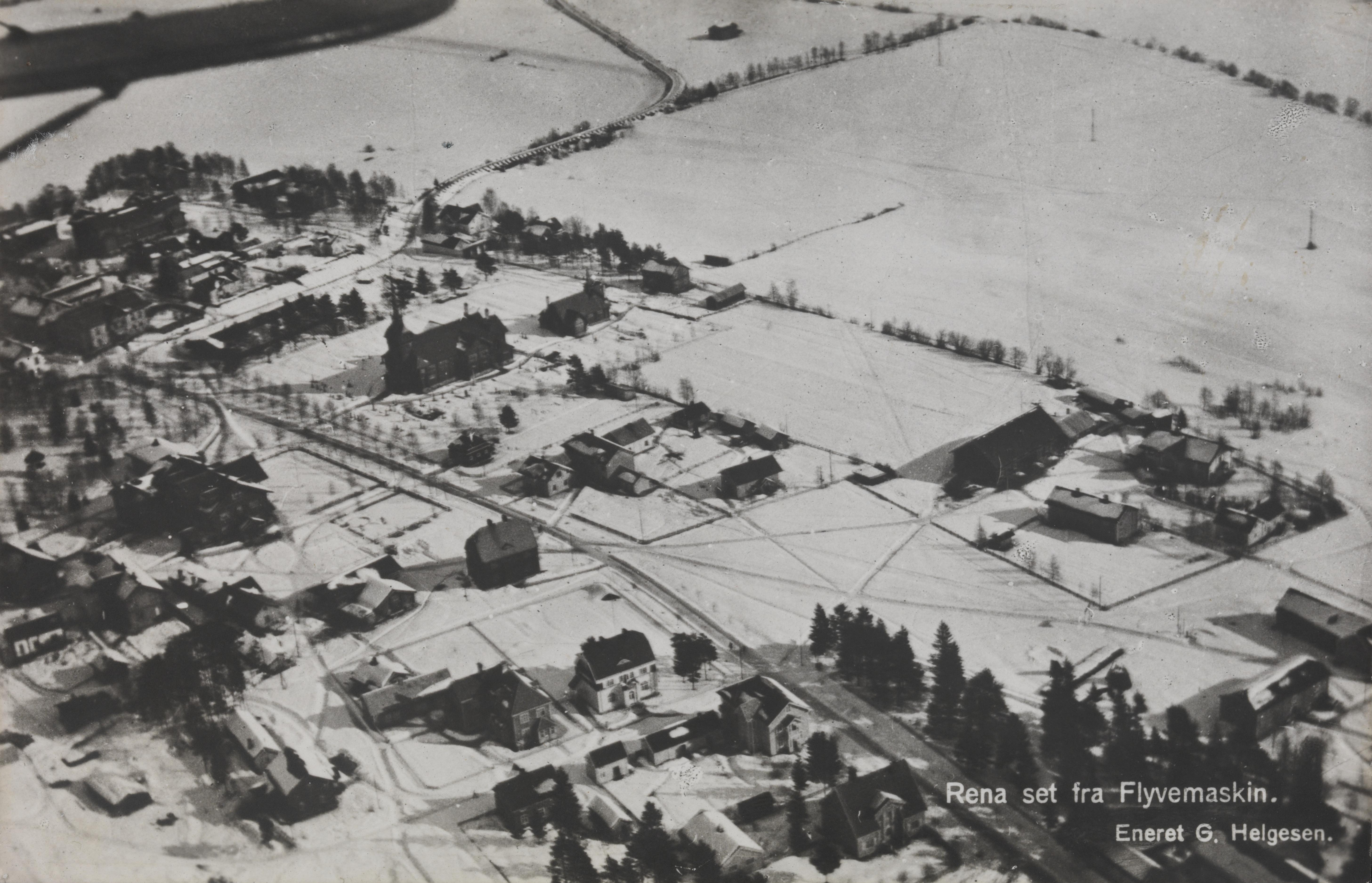 Bildet er hentet fra Nasjonalbibliotekets bildesamling Rena, Åmot, Hedmark